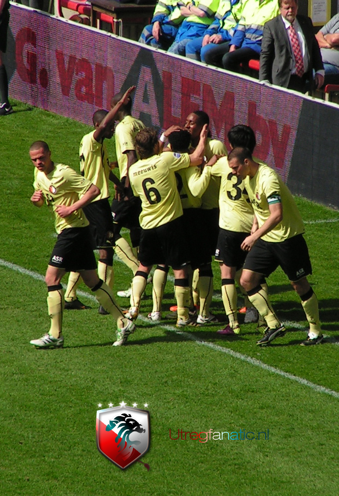 Luc Castaignos